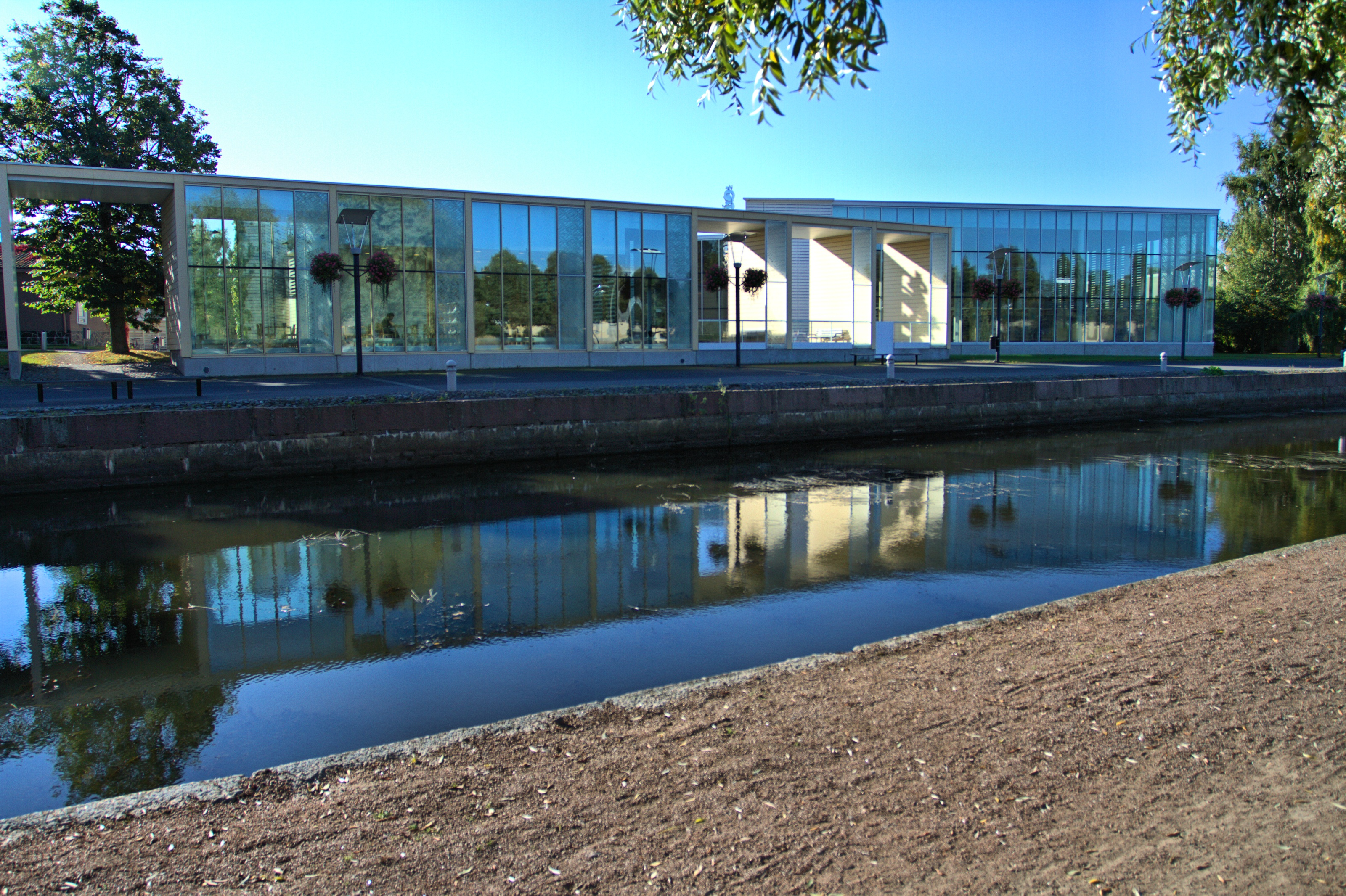 Main library in Rauma